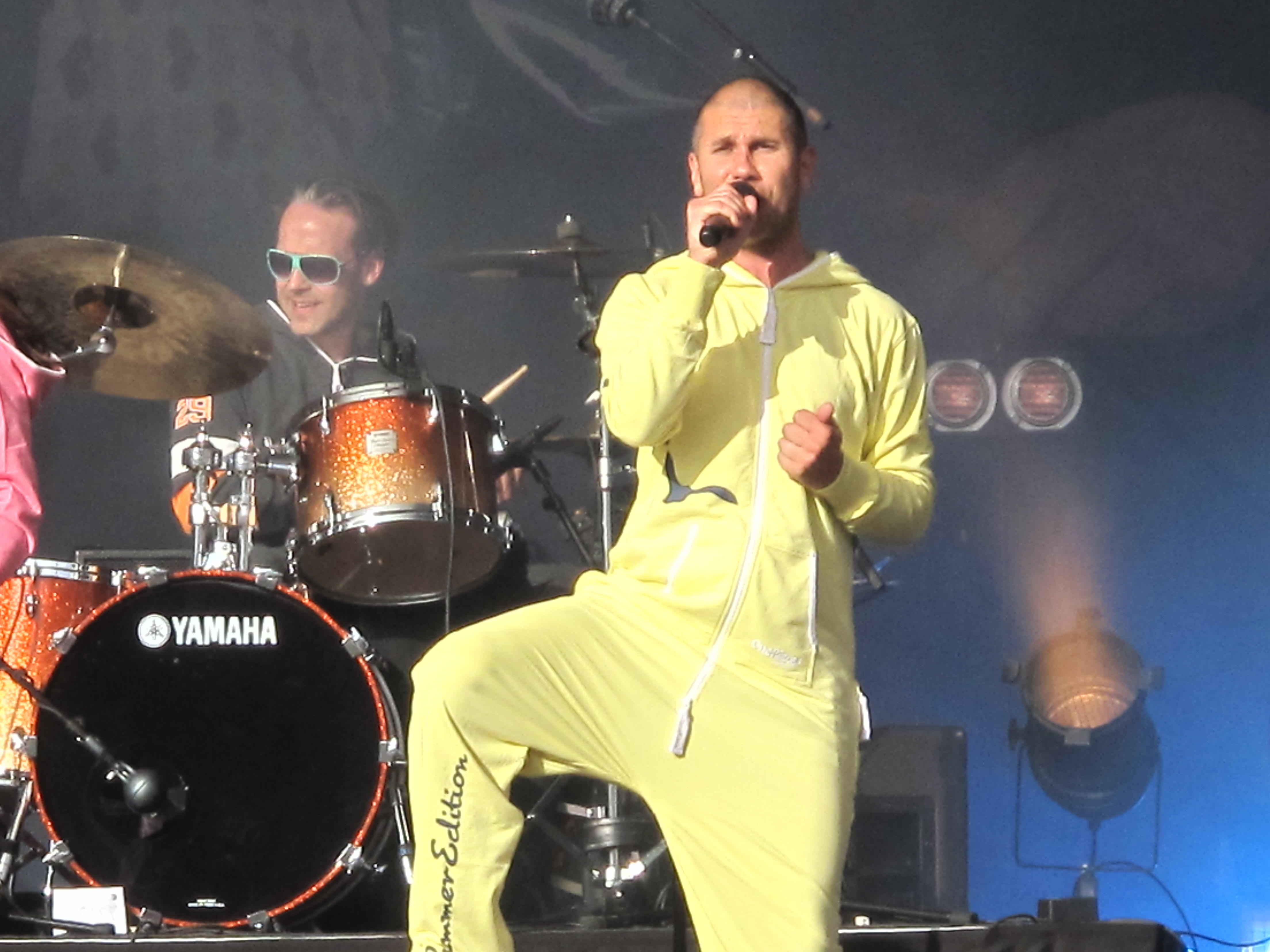 Markoolio på Liseberg 25 maj 2011.